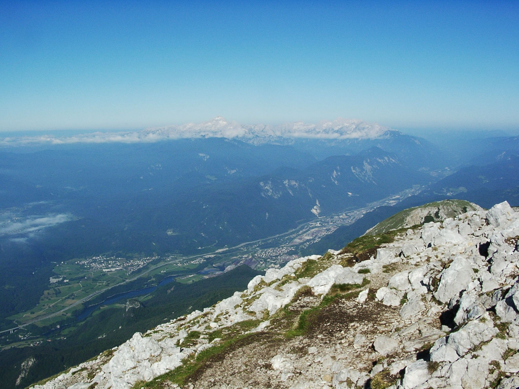 Jesenice z vrha Stola. V ozadju Julijske Alpe. Foto: matijap pogovor